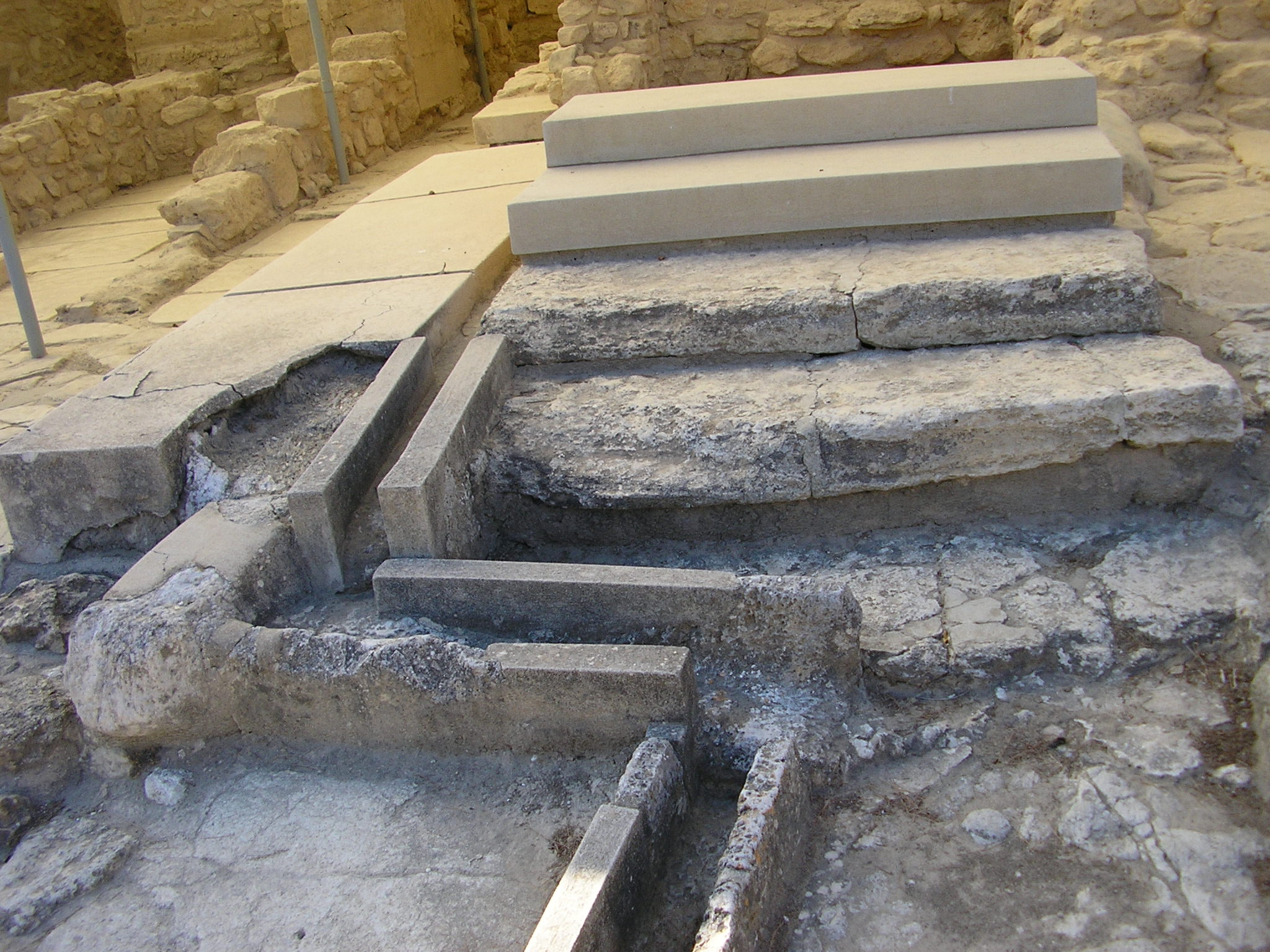 Вважається, що Кносс є першим в історії людства містом, де використовувались водяні туалети з каналізацією